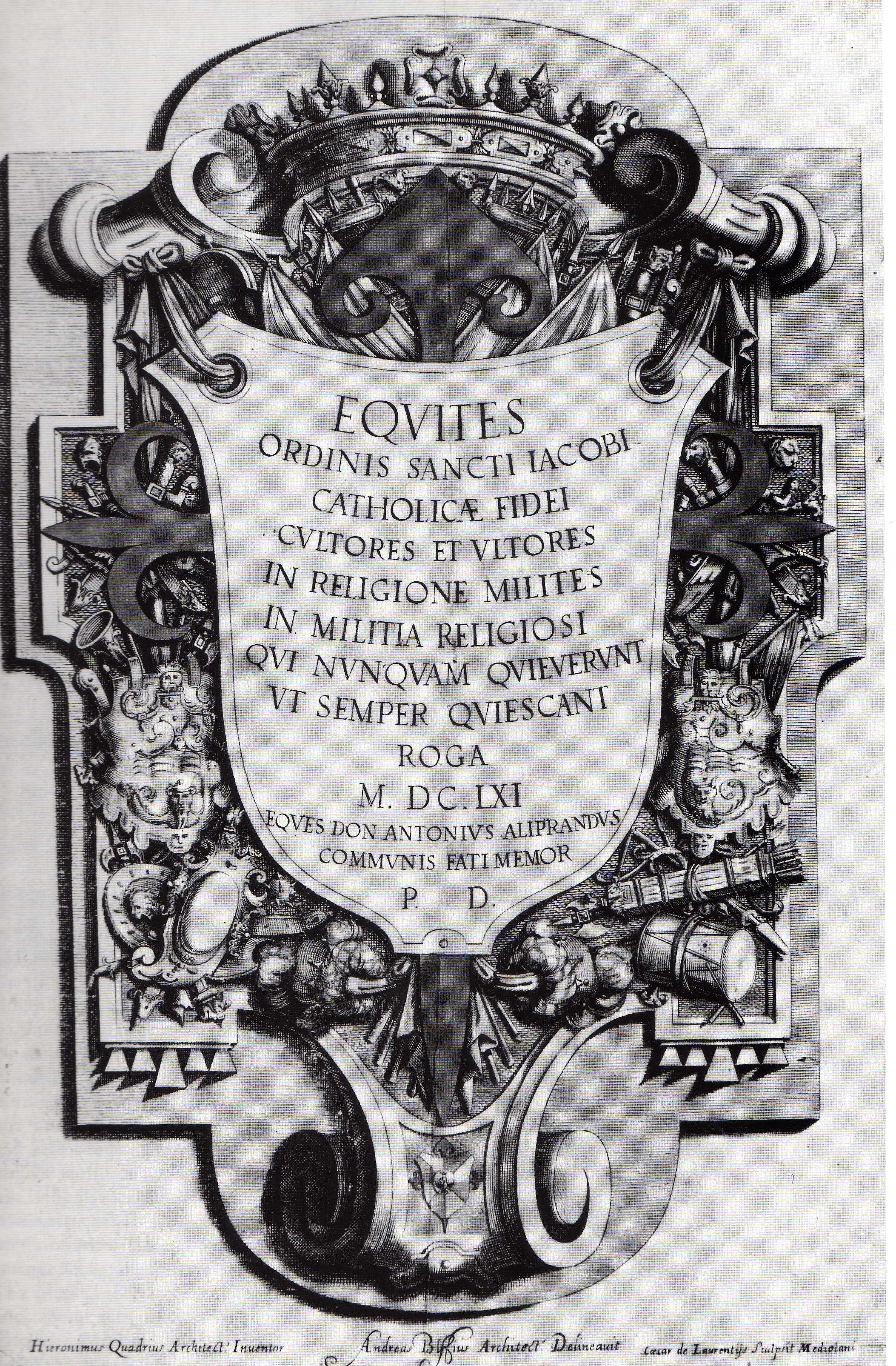 Stampa raffigurante il sepolcro dei Cavalieri dell'Ordine di Santiago, esistente fino agli anni cinquanta del Novecento nella chiesa di San Marco in Milano: scolpita alla base l'arma del Conte Don Antonio degli Aliprandi, Cavaliere di Santiago e Provveditore dell'Ordine nello Stato di Milano. Si nota un errore nel disegno dello stemma in quanto i colori del grembiato sono invertiti